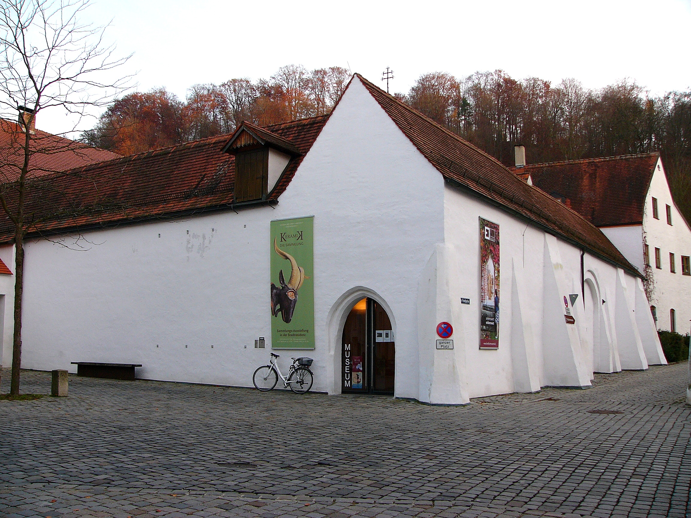 Ehem. Franziskanerkloster; gegründet 1280, aufgehoben 1802, anschließend teilweise abgebrochen, Portalfragment der ehem. Klosterkirche, wohl Ende 13. Jahrhundert; Rest des inneren Kreuzganges mit zweischiffiger gotischer Halle, wohl 2. Hälfte 14. Jahrhundert; Äußerer Kreuzgang mit spätgotischer Einwölbung, 14. und 15. Jahrhundert; Plankkapelle, erbaut 1495; Betriebsgebäude der Landshuter Malzfabrik, im Kern vielleicht spätmittelalterlich, barocker Umbau und Ausbau des frühen 19. Jahrhunderts; Reste der alten Klostermauer, mittelalterlich; im Osten davon Teilstück der mittelalterlichen Stadtmauer mit hohen Rundbogennischen, etwa 5-6 m hoch, 14./15. Jahrhundert; Wehrturm der mittelalterlichen Stadtbefestigung, mit Zinnen und Pechnasen, wohl 14./15. Jahrhundert.This is a photograph of an architectural monument.